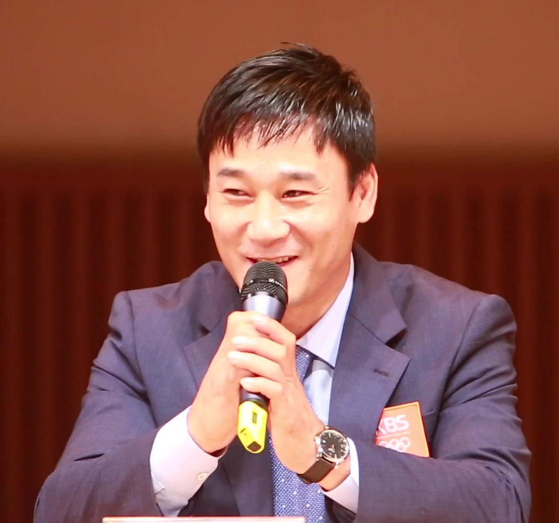 (TV TEN) 2016년 KBS 리우올림픽 방송단 발대식